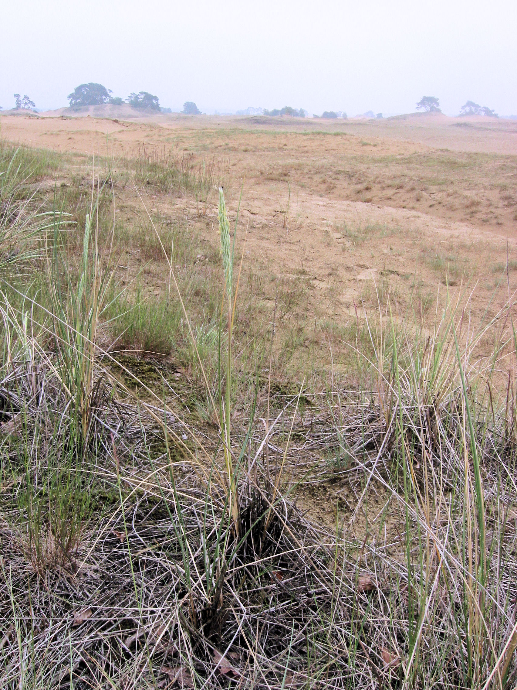 Ammophila arenaria (Helm bloeiende plant)